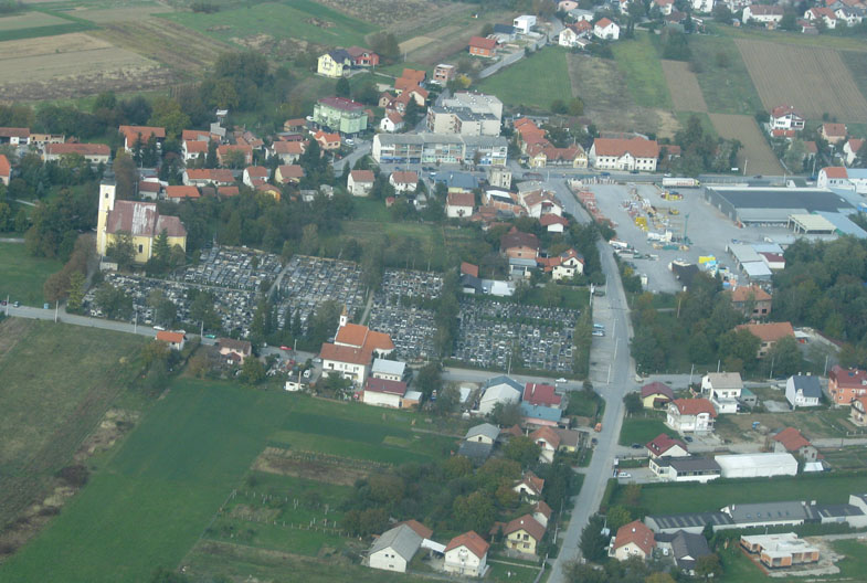 Središte Lučkog, Zagreb